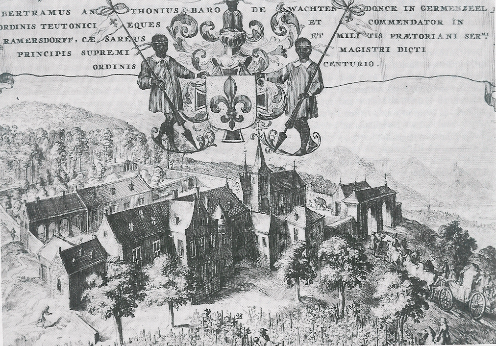 Kommende Ramersdorf